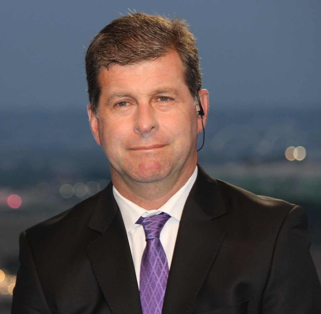 Edgardo Esteban. Periodista .Escritor.Ex-Combatiente de Malvinas.Político Argentino.